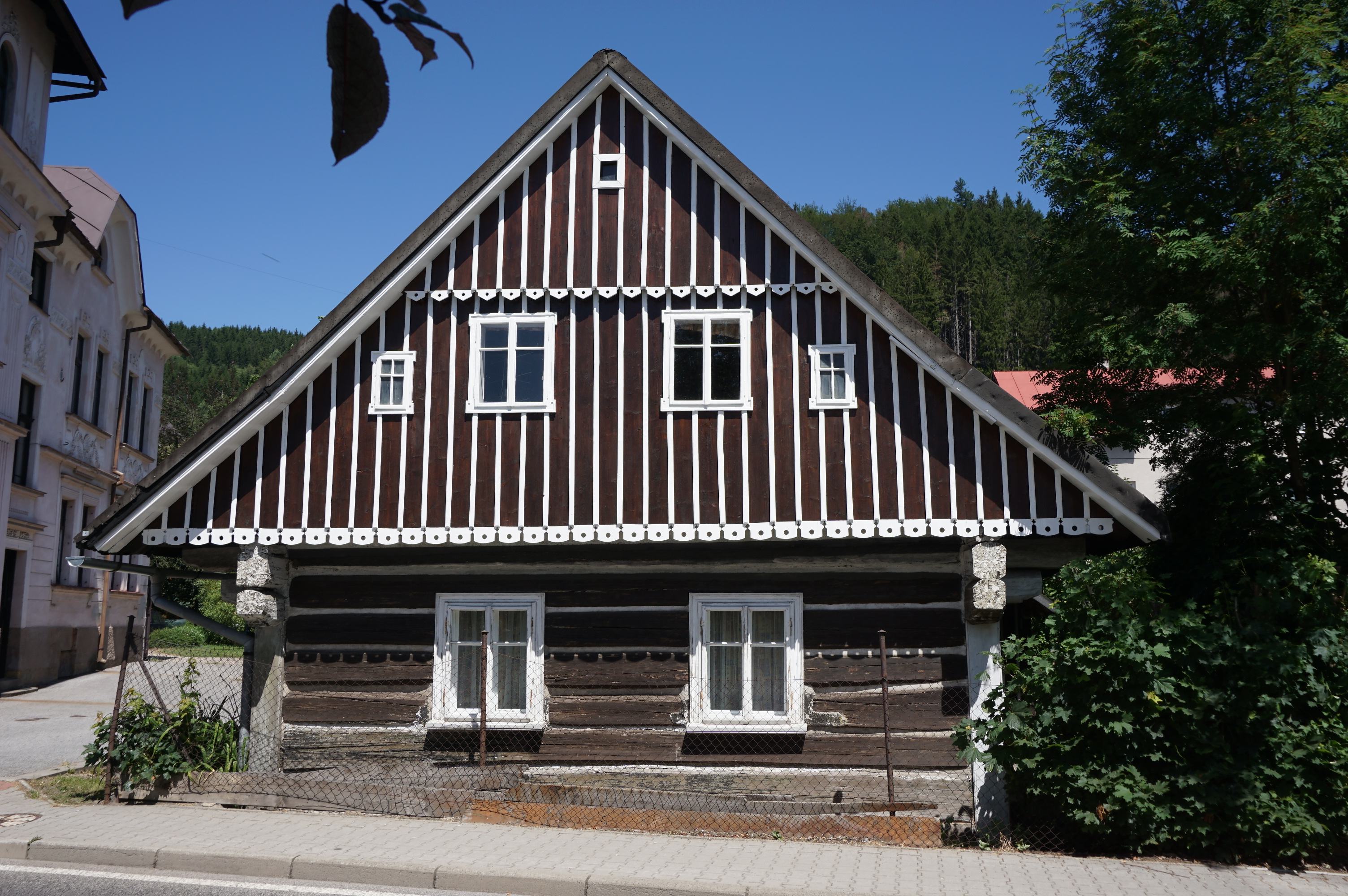 Dům čp. 289, Jablonec nad Jizerou 289, Jablonec nad Jizerou.